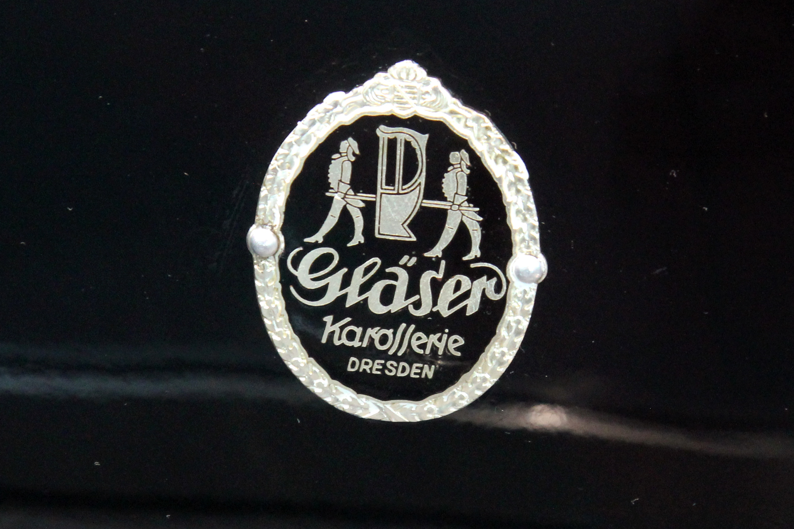 Horch 855 mit Gläser-Karosserie im museum mobile in Ingolstadt. 8-Zylinder-Reihenmotor, 4911 cm³, 120 PS bei 3600/min, Höchstgeschwindigkeit 140 km/h, Verbrauch: 22 l/100 km. 7 Stück wurden gebaut, Preis: 22.000 RM.